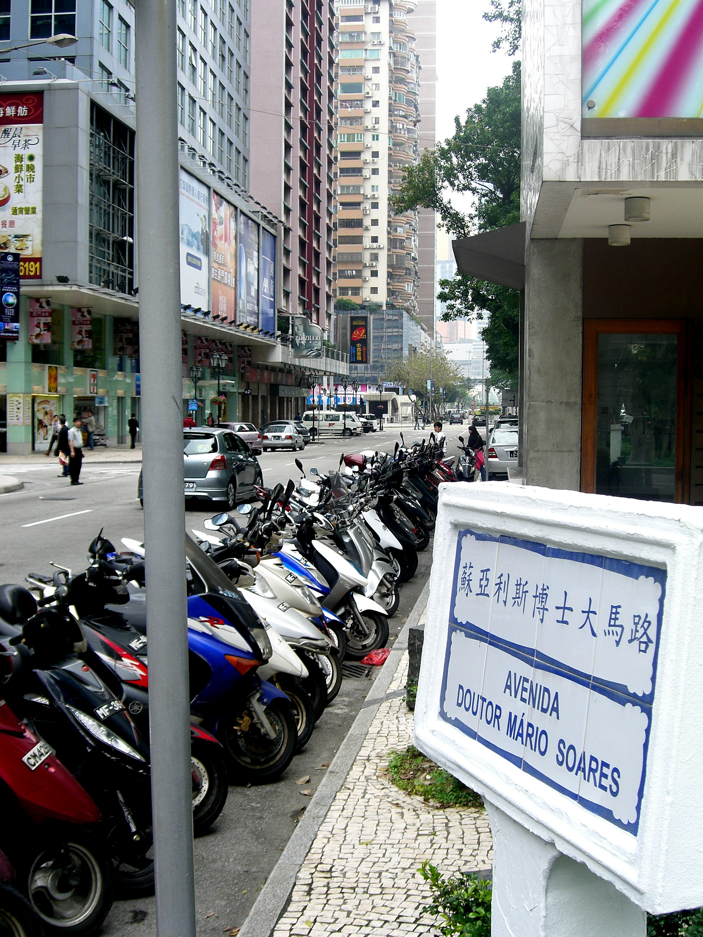 蘇亞利斯博士大馬路